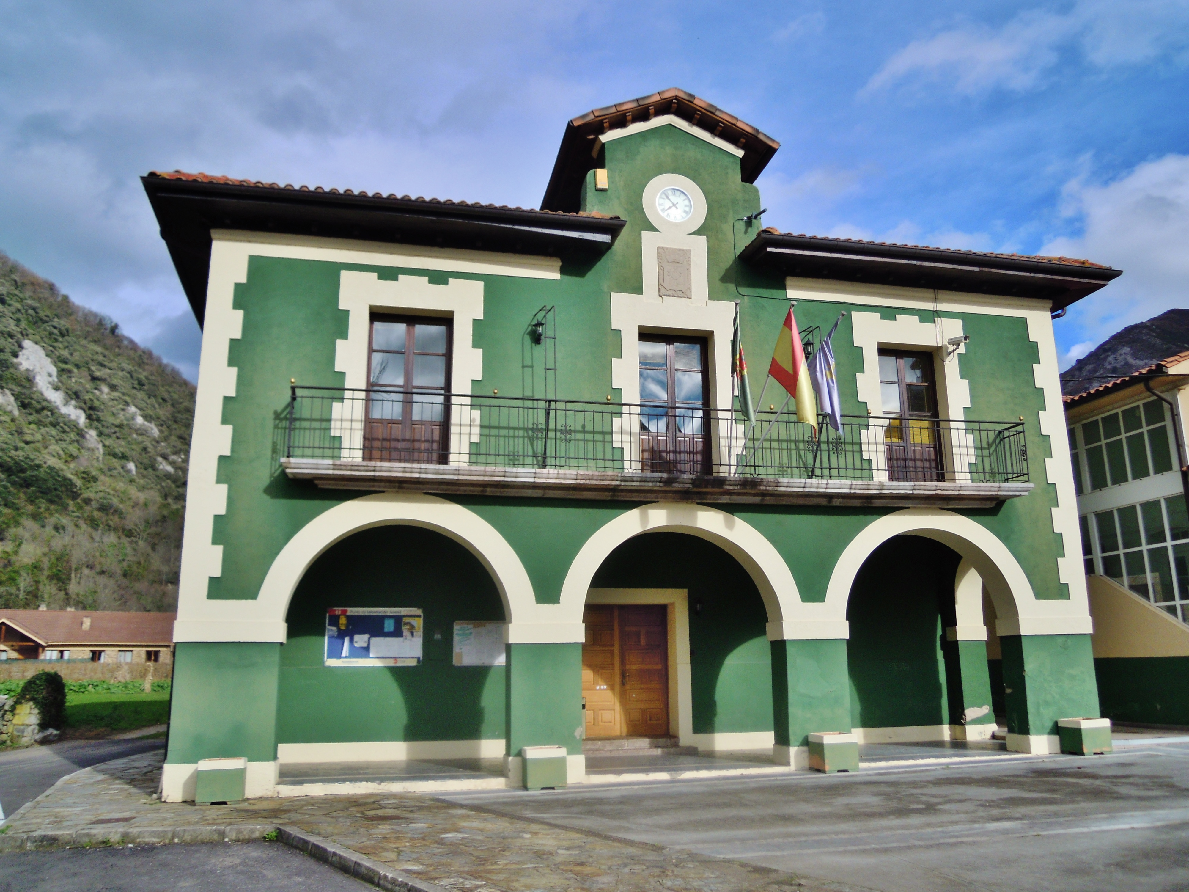 Casa conceyu Santu Adrianu